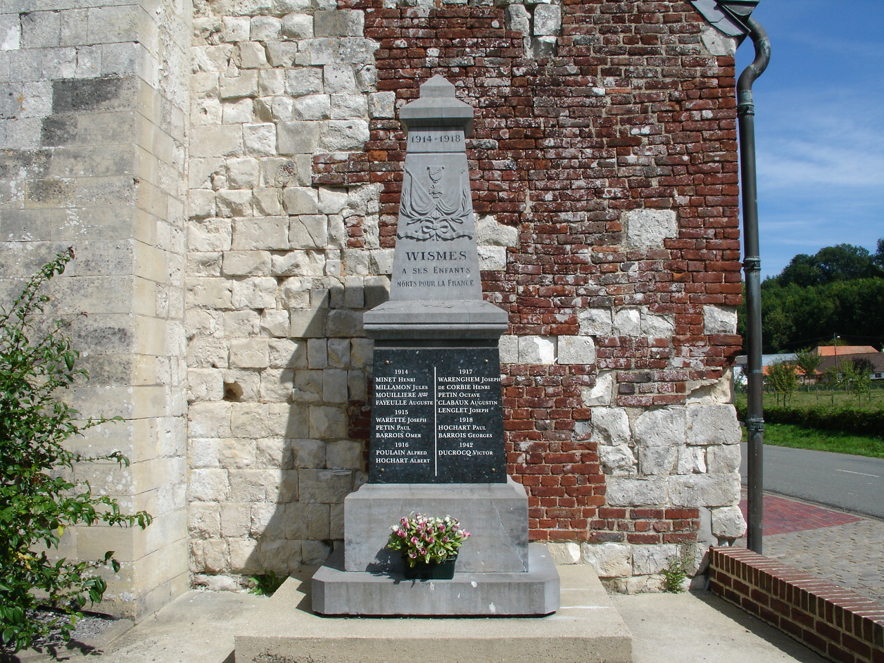 Monument aux morts de Wismes, à côté de l'église Saint André